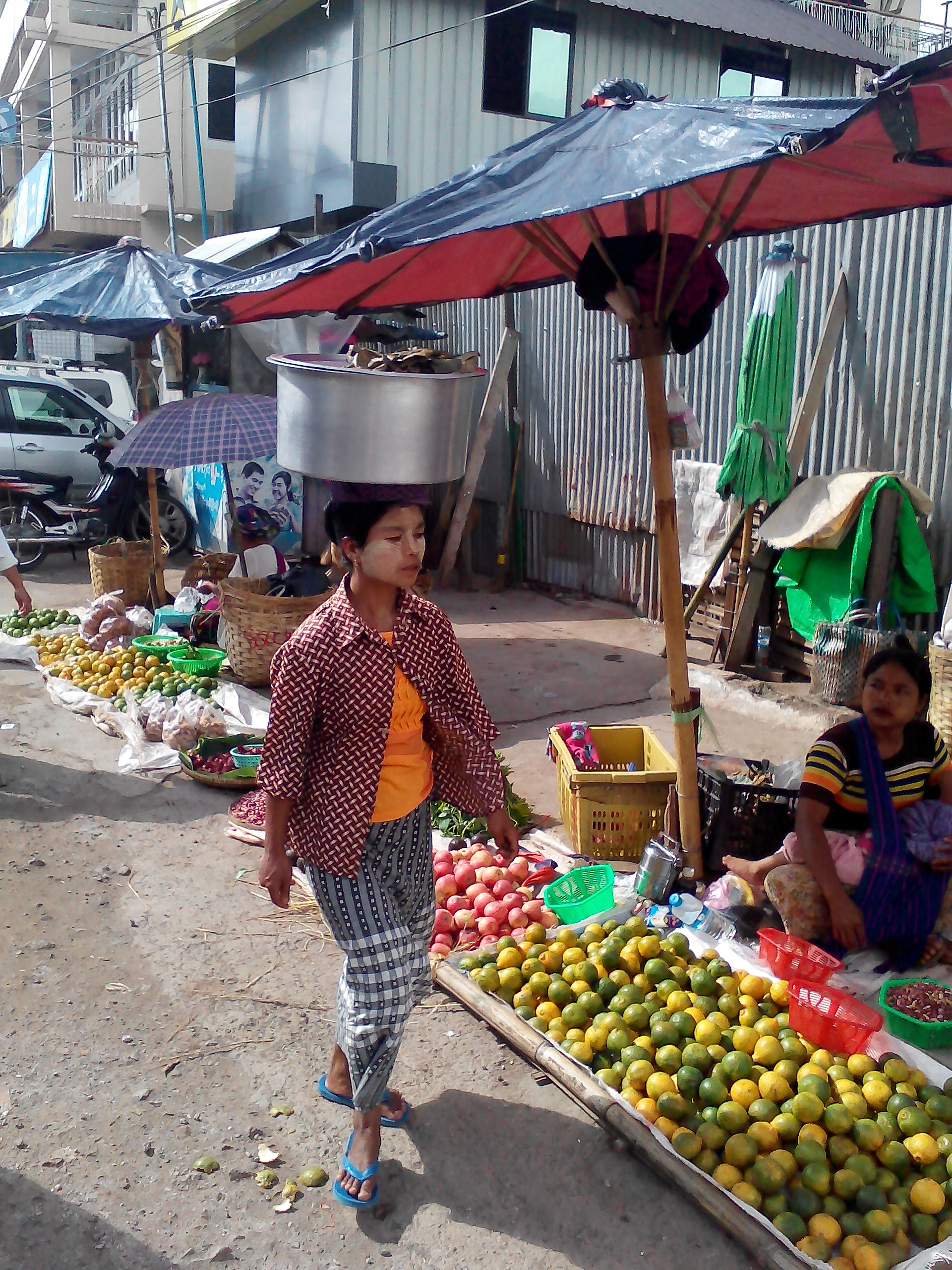 Мьянма. Таунджи. Жінка на базарі